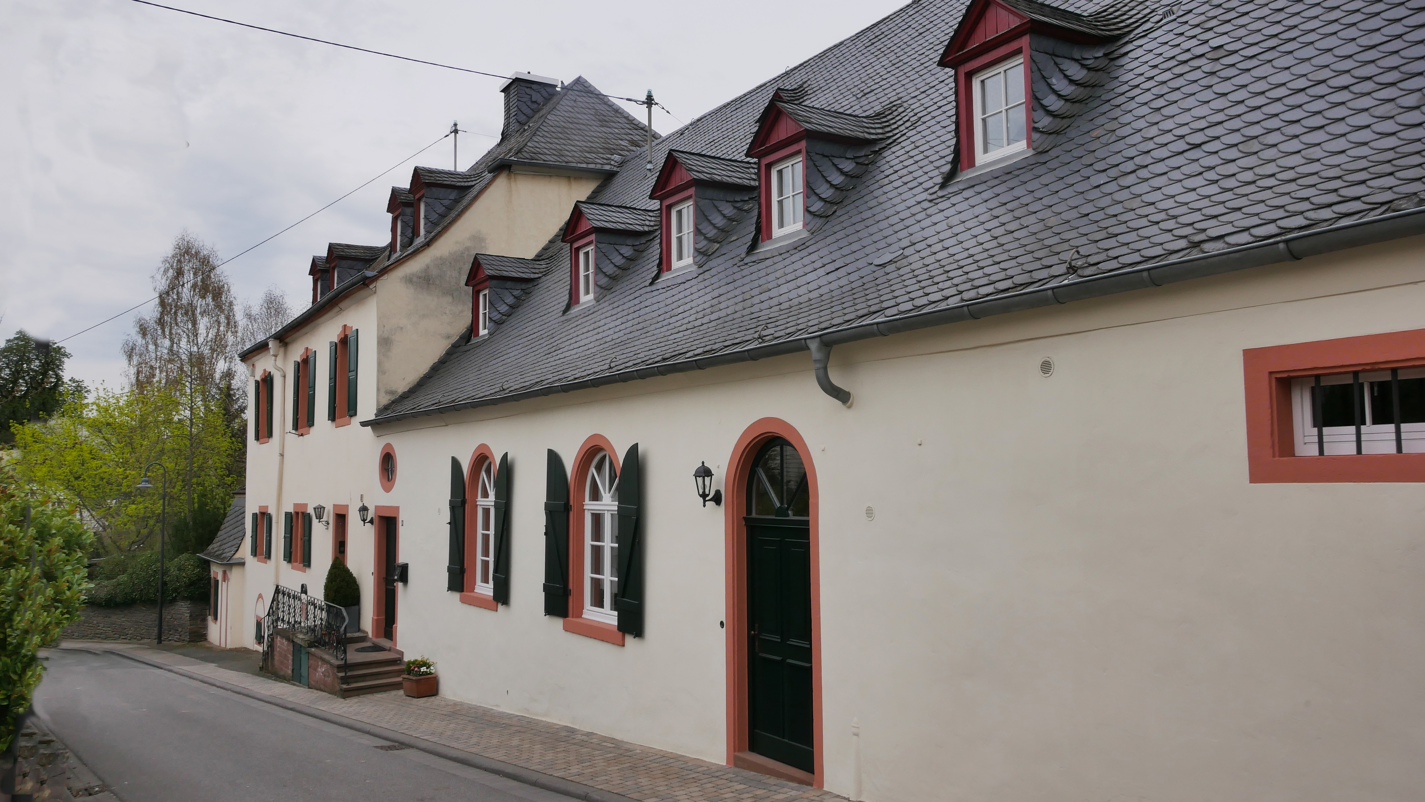 Ehemaliges Hofhaus des Klosters St. Irminen in Trier in Kasel (Ruwertal)